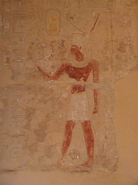 Détail d'un relief peint représentant Thoutmosis Ier coiffé de la couronne rouge de Basse Égypte ; les figures des dieux ont été effacées - Temple d'Hatchepsout à Deir el-Bahari - XVIIIe dynastie égyptienne